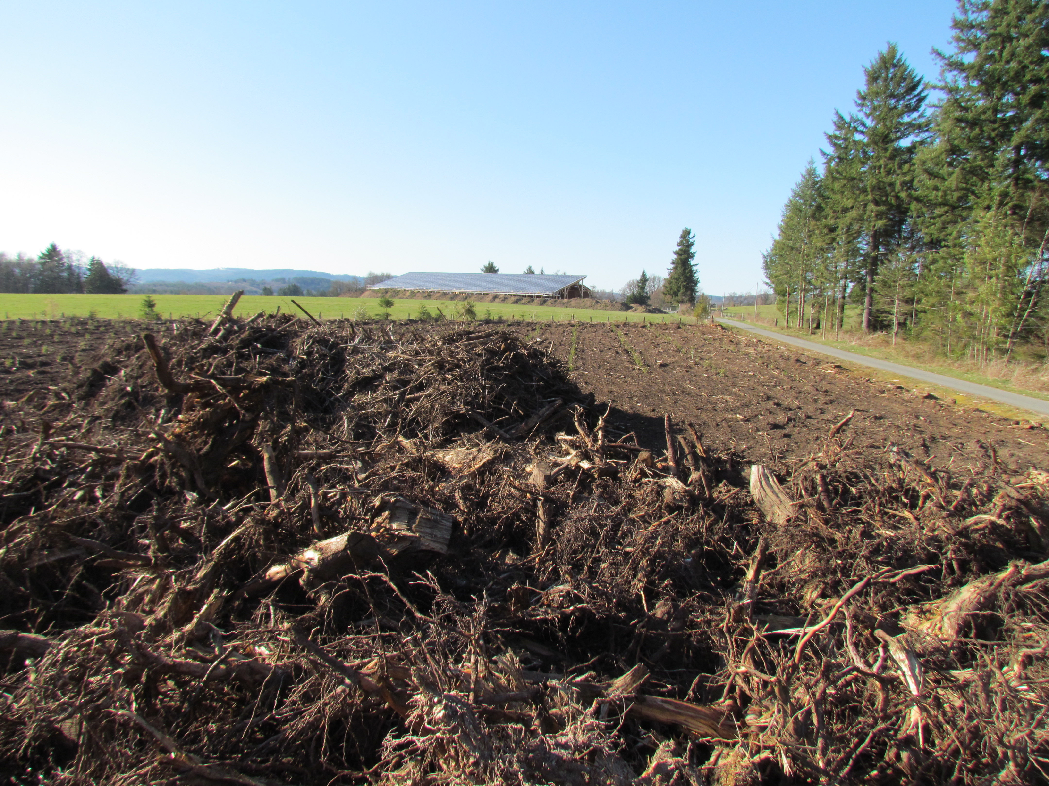 plantation de Douglas (Pseudotsuga menziesii) du printemps 2011 après andainage des rémanents et travail du sol très (trop ?) soigné. Près d'Ussel (Corrèze)